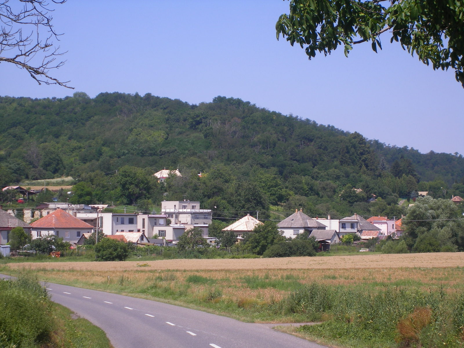 Százd - a falu látképe kelet felől